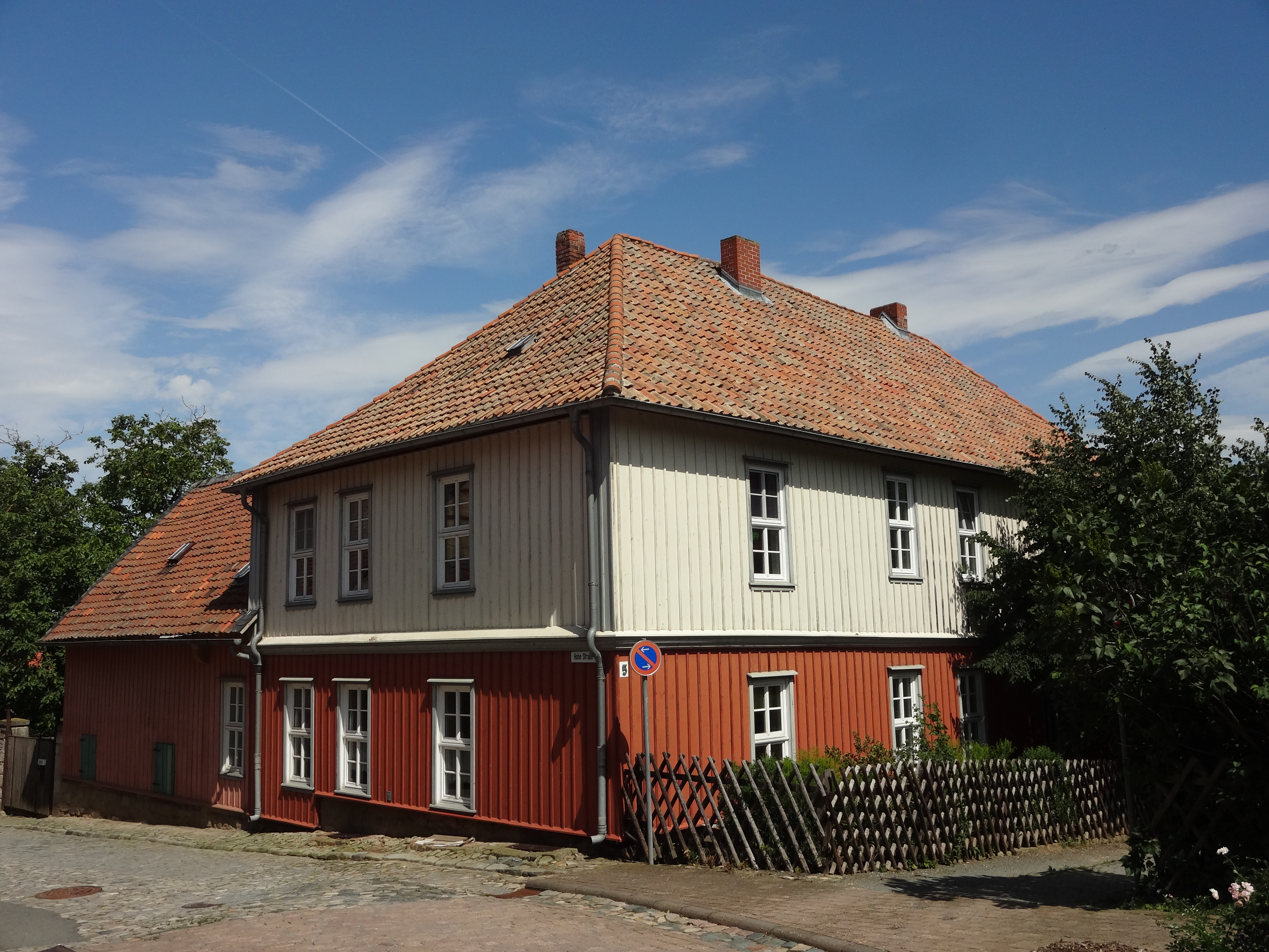 denkmalgeschütztes Pfarrhaus in der Hohen Straße 5 in Börnecke, Ortsteil von Blankenburg/Harz